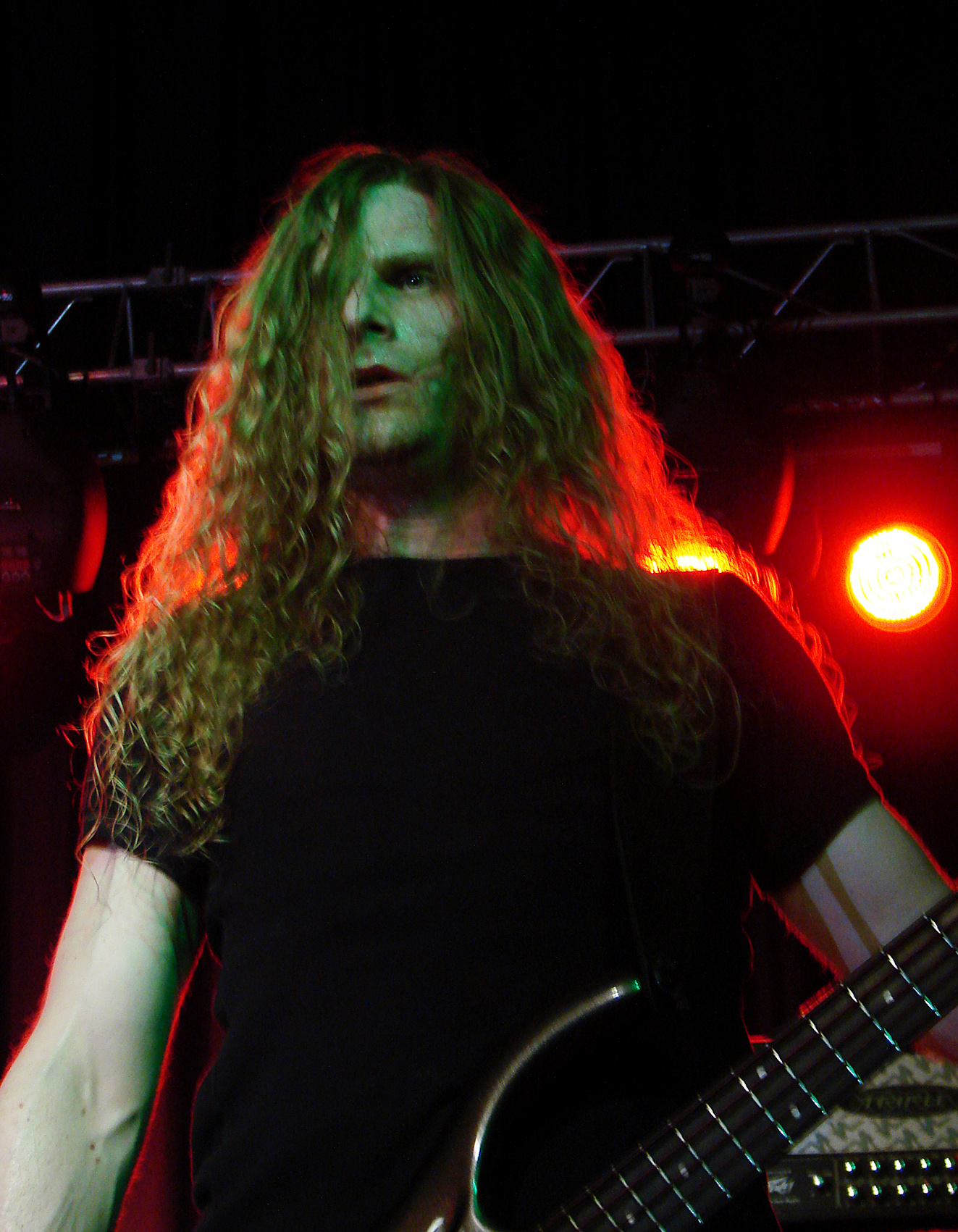 Melechesh au Chaulnes Fest, le 22/03/08.